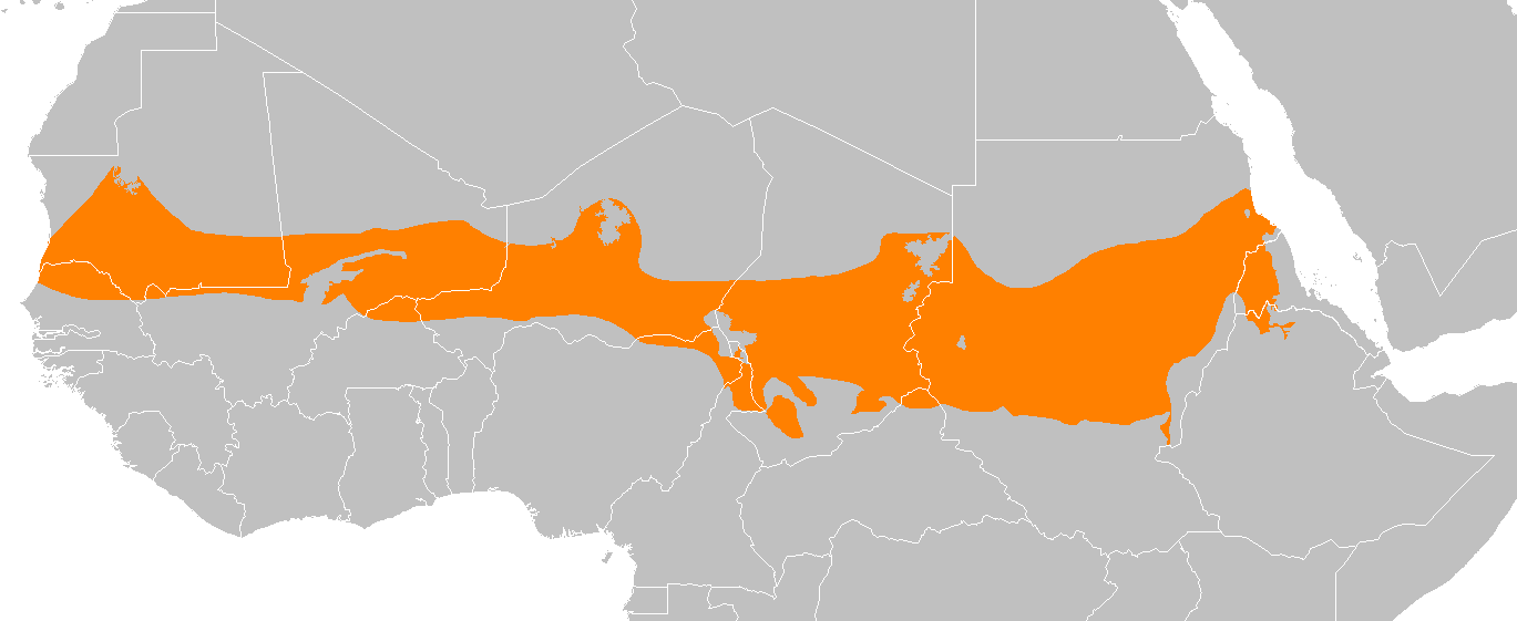 Sahelian Acacia savanna map